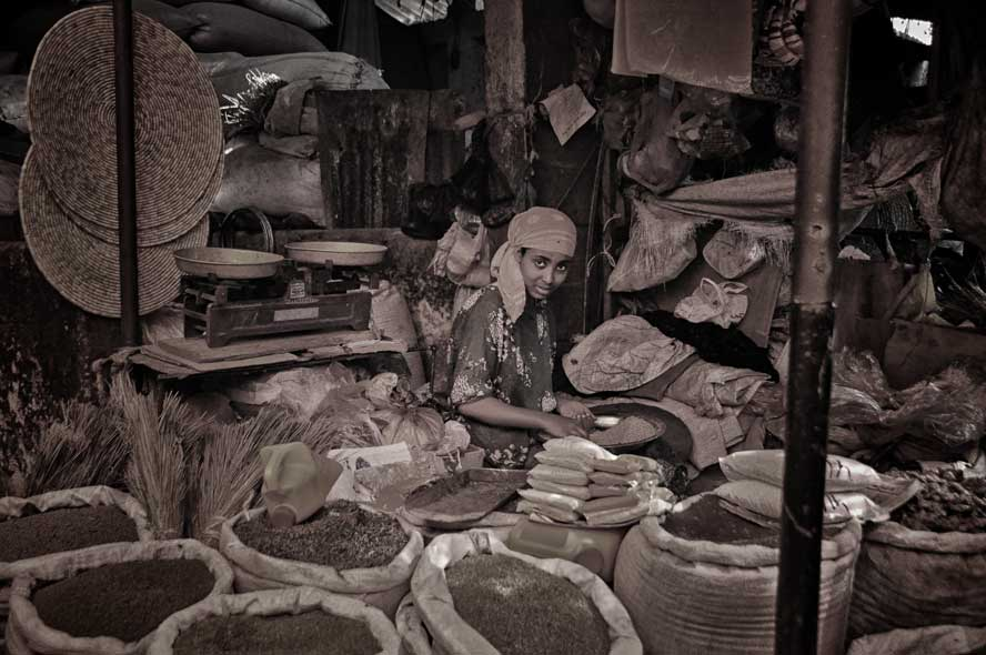 Ethiopia